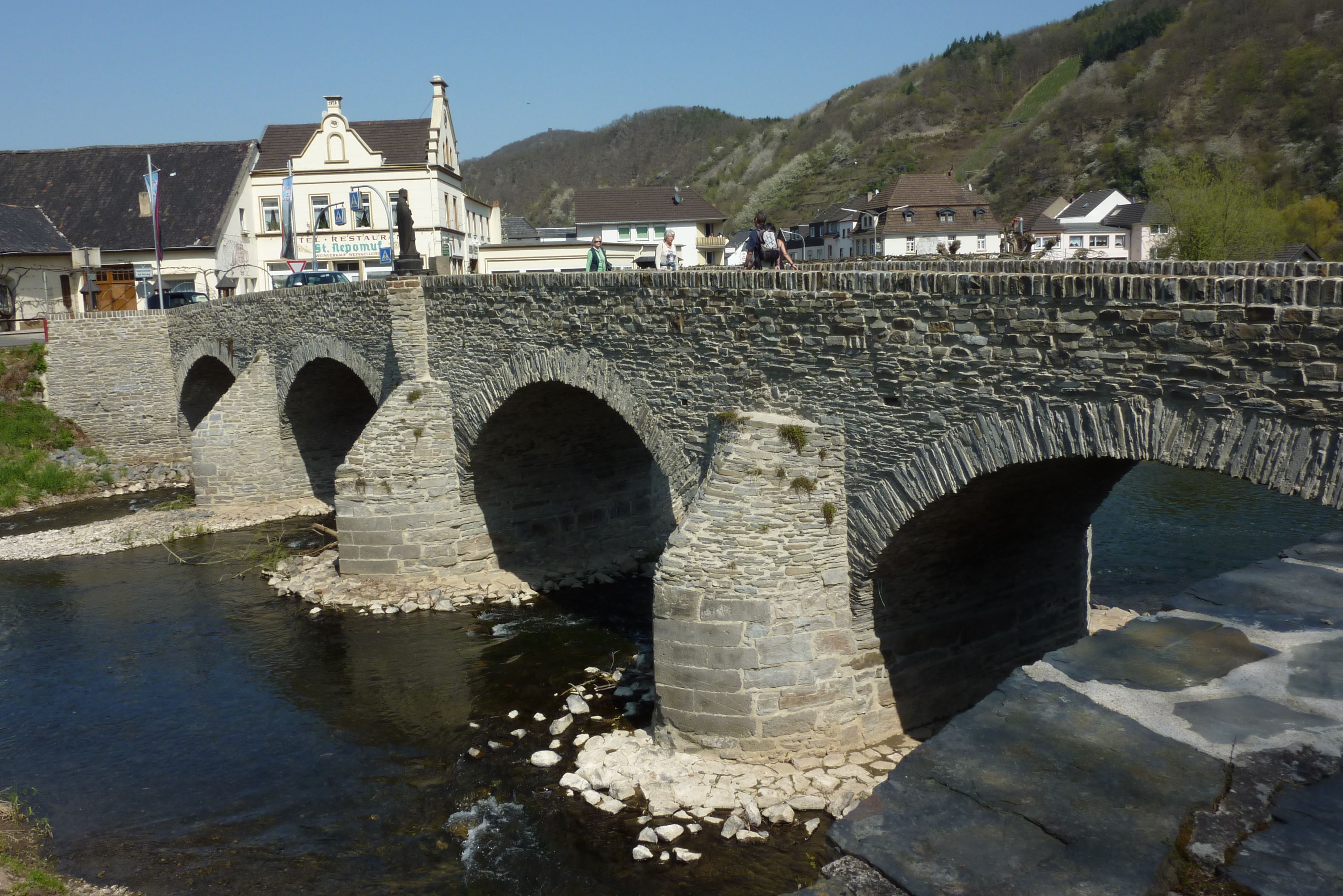 Nepomuk-Brücke nach der Renovierung von 2009, Rech